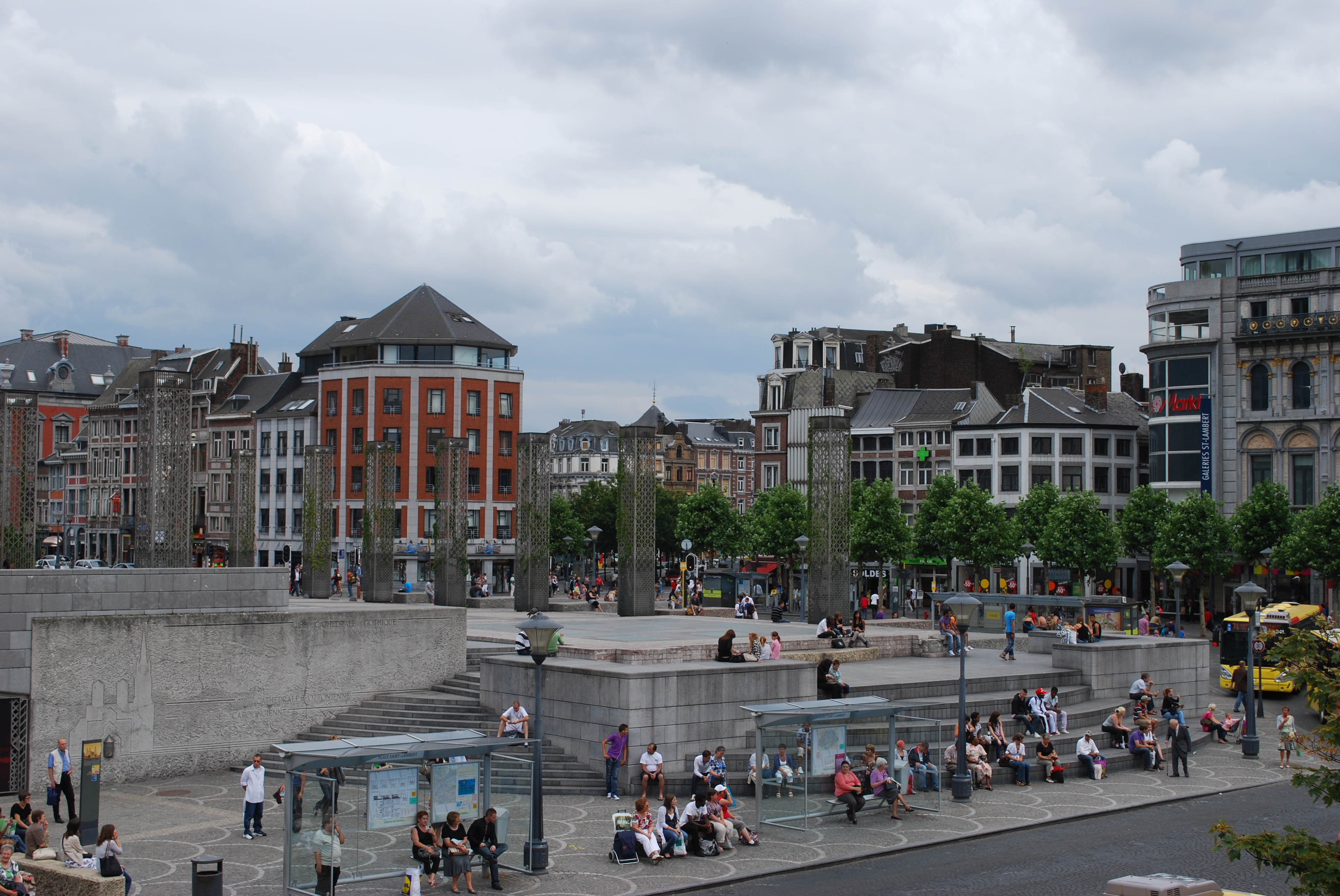 La place Saint-Lambert à Liège.